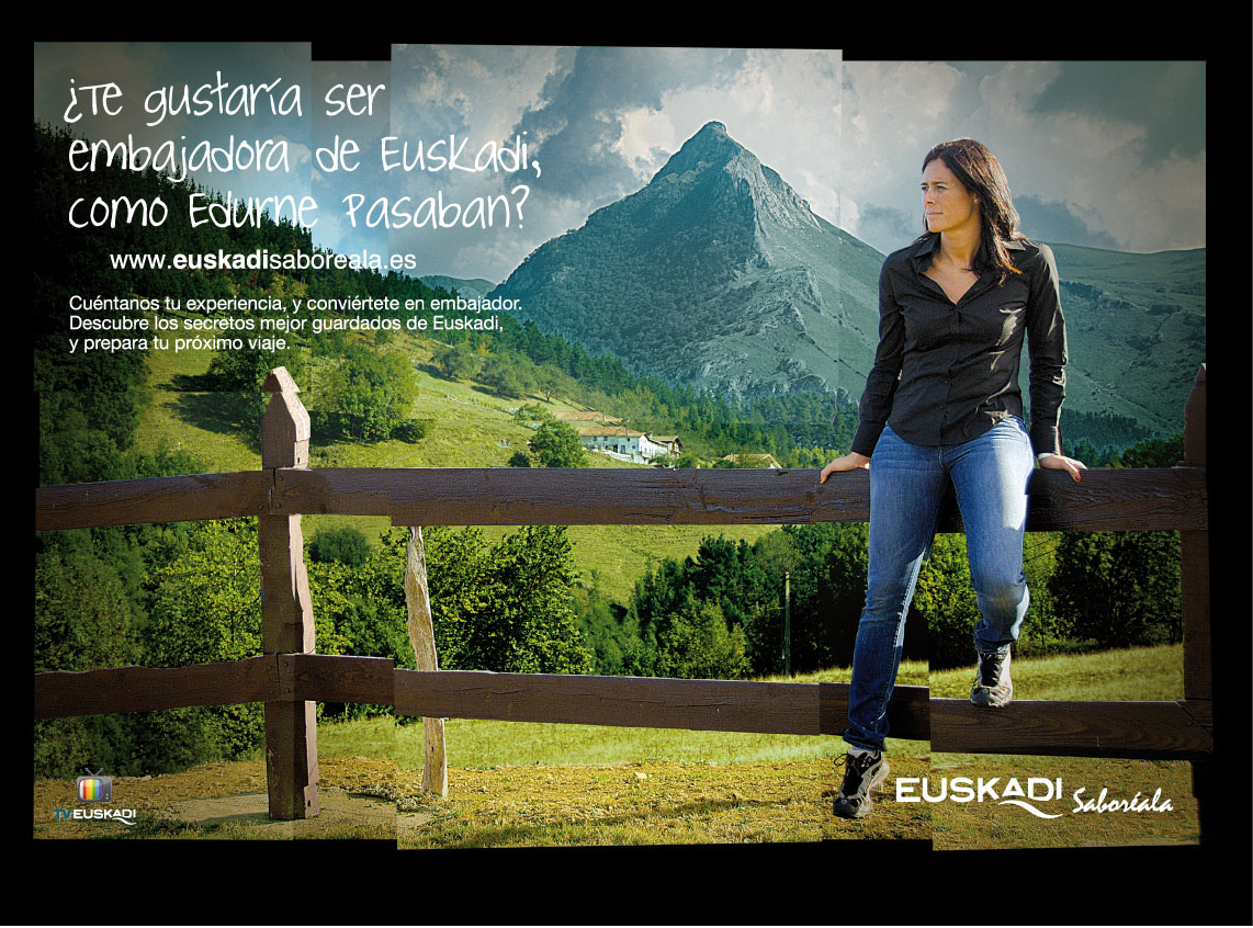 Martín Berasategui, Modesto Lomba, Edurne Pasaban y Miguel de la Quadra-Salcedo se convierten en 'Embajadores de Euskadi'